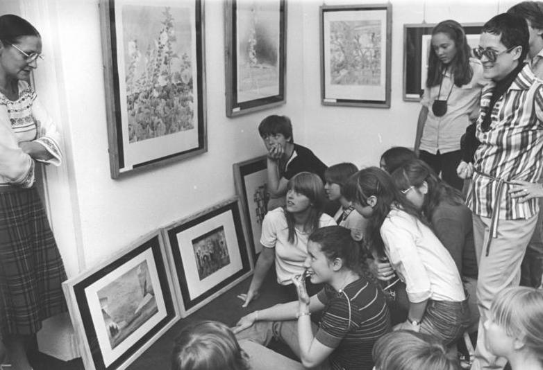 Leipzig, Jugendstunde in einer Kunstgalerie ADN-ZB Grubitzsch 24.6.82 Leipzig: Atelier. Ein beliebter Treffpunkt für Kunstgespräche ist die Leipziger Galerie am Sachsenplatz mit ihren Ausstellungen zeitgenössischer bildender Kunst. Wie die Schüler der 8. Klasse der Egon--Erwin-Kisch-Oberschule nutzen viele Jugendweiheteilnehmer, Studentengruppen sowie Kollektive aus Betrieben und Institutionen dieses Kunstzentrum, um sich mit Werken der Malerei und Grafik auseinanderzusetzen. Gisela Schulz (l), stellvertretende Galerieleiterin, führt solche Gespräche. Seit ihrer Gründung beherbergte die Galerie 100 Ausstellungen, u.a. mit Werken von Werner Tübke, Arno Mohr, Willi Sitte, Max Schwimmer und mit Arbeiten von Bauhaus-Künstlern.